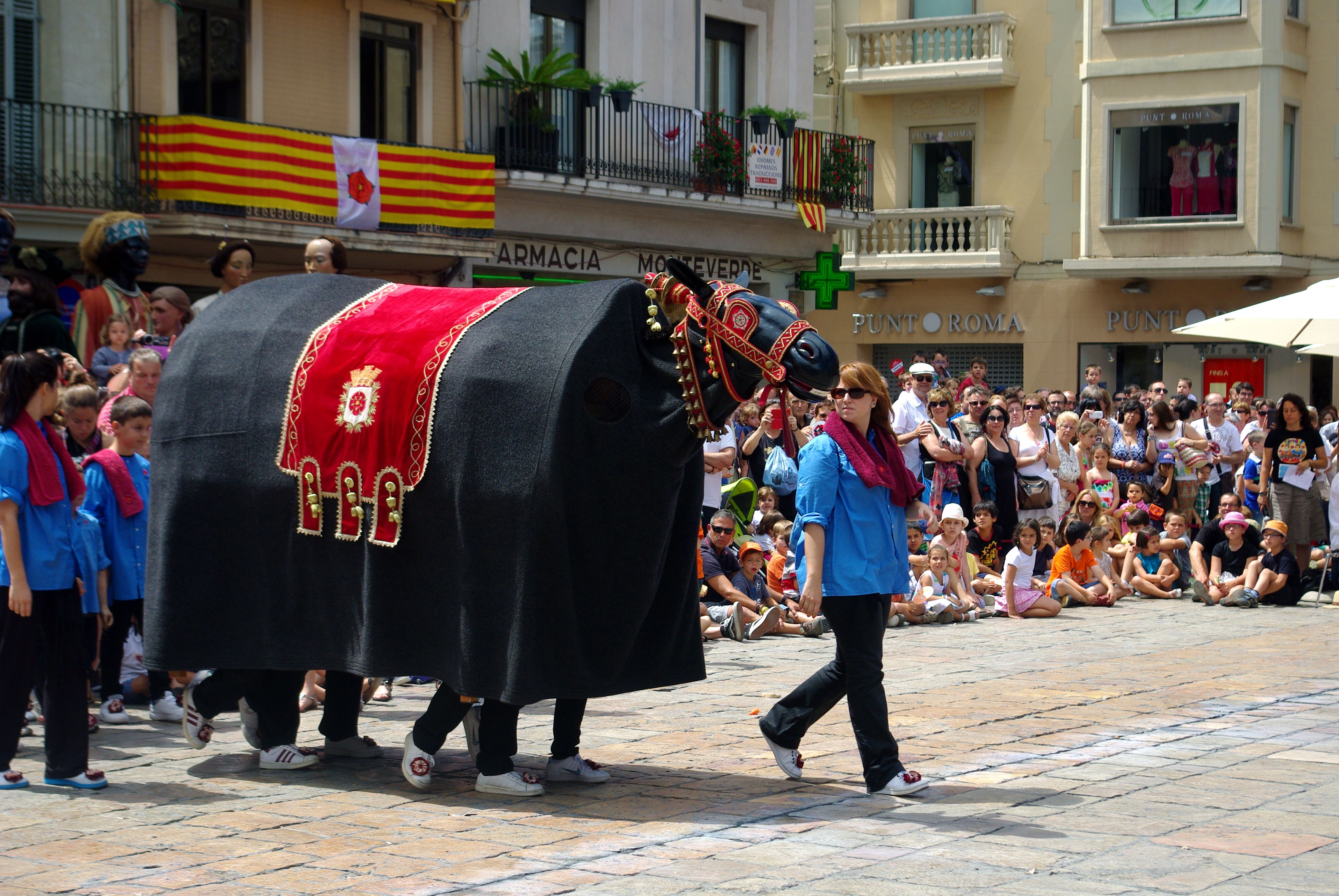 La Mulassa al Mercadal. Sant Pere 2014